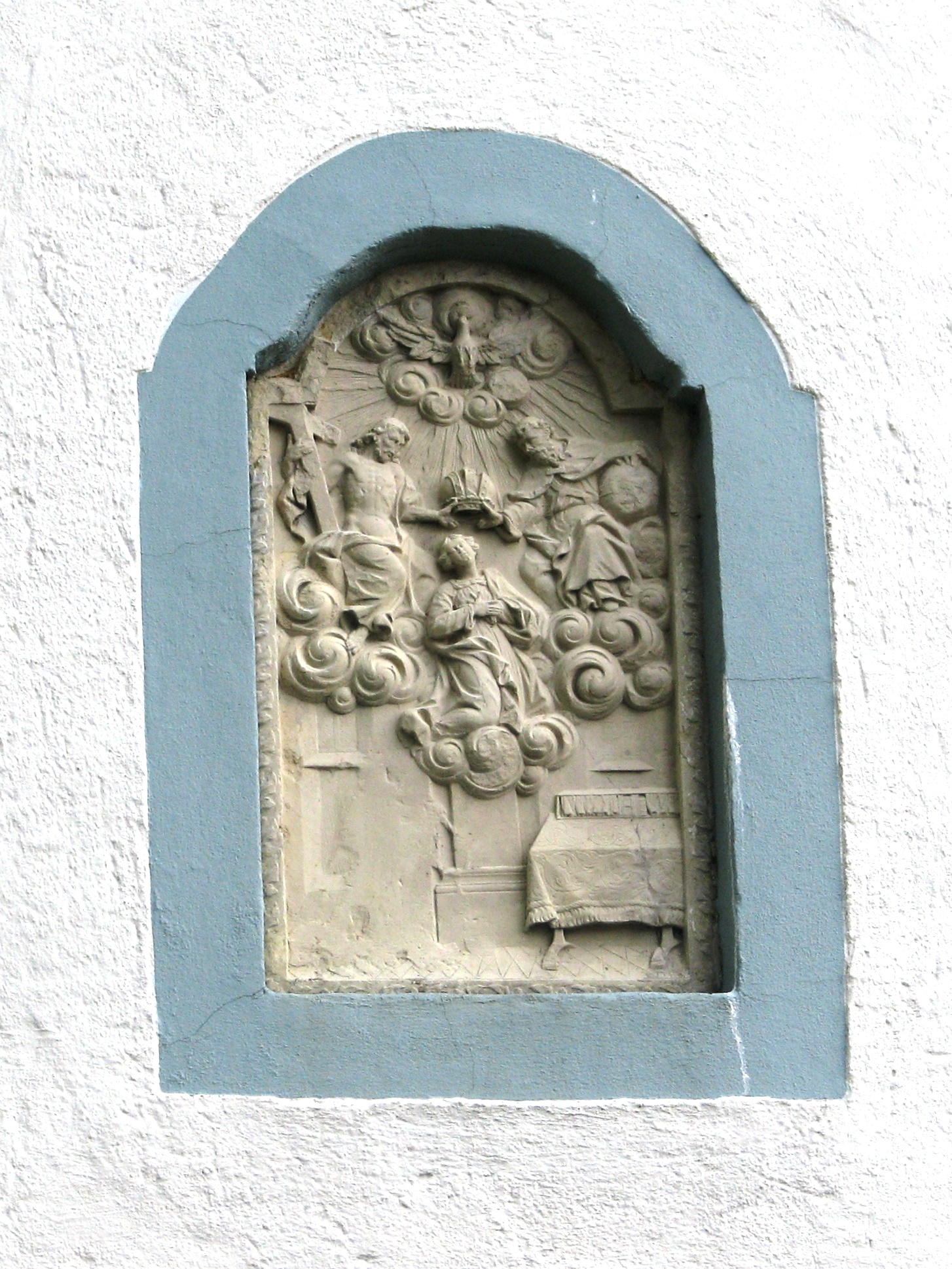 Wimpasing bei Eichstätt, Reliefplatte "Krönung Mariens" am Steidl-Anwesen, 18. Jahrhundert.